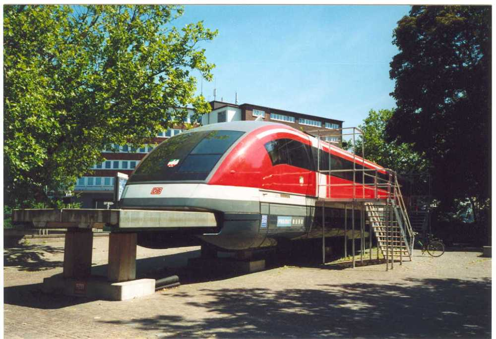 Das Modell des Transrapid 07 in den Metrorapidfarben vor der Messe in Essen